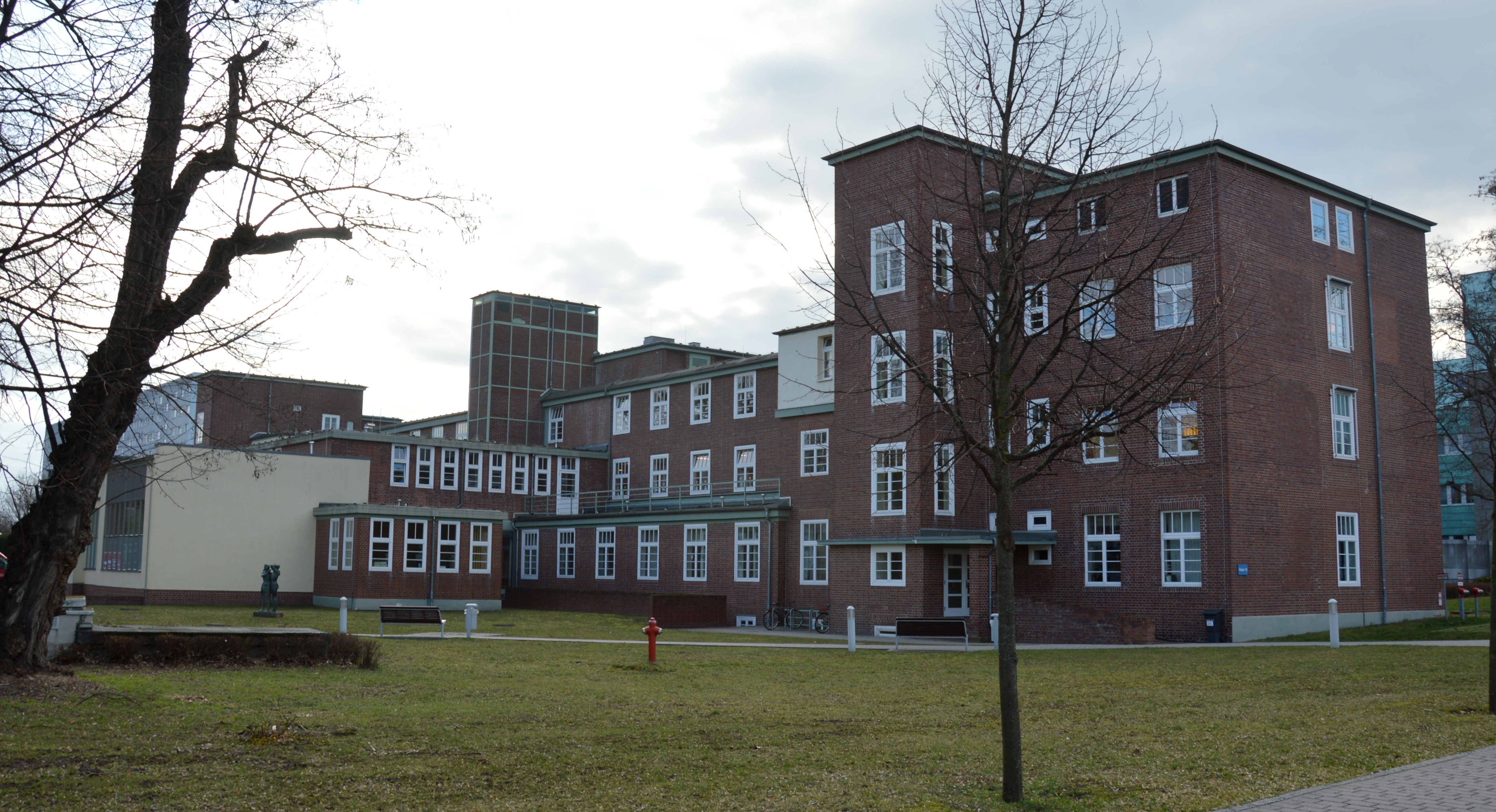 Uniklinikum Magdeburg Gebäude 10